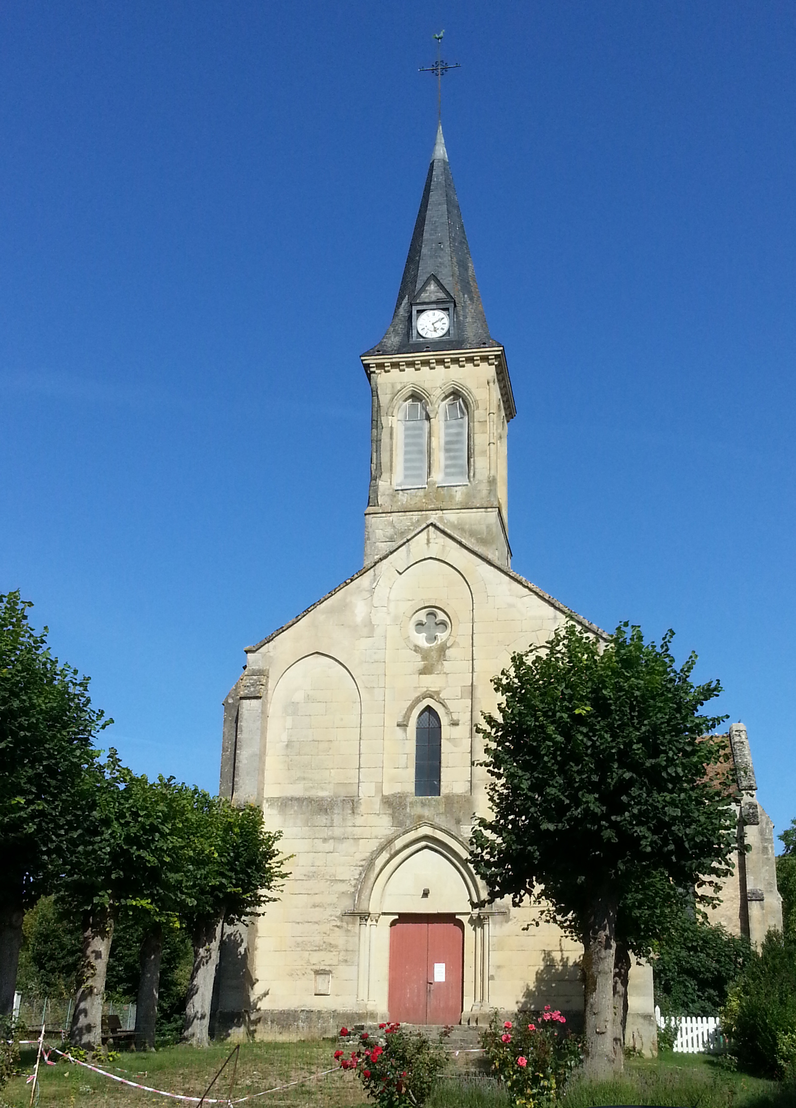 La façade et le clocher de l'église moderne. État en été 2017.